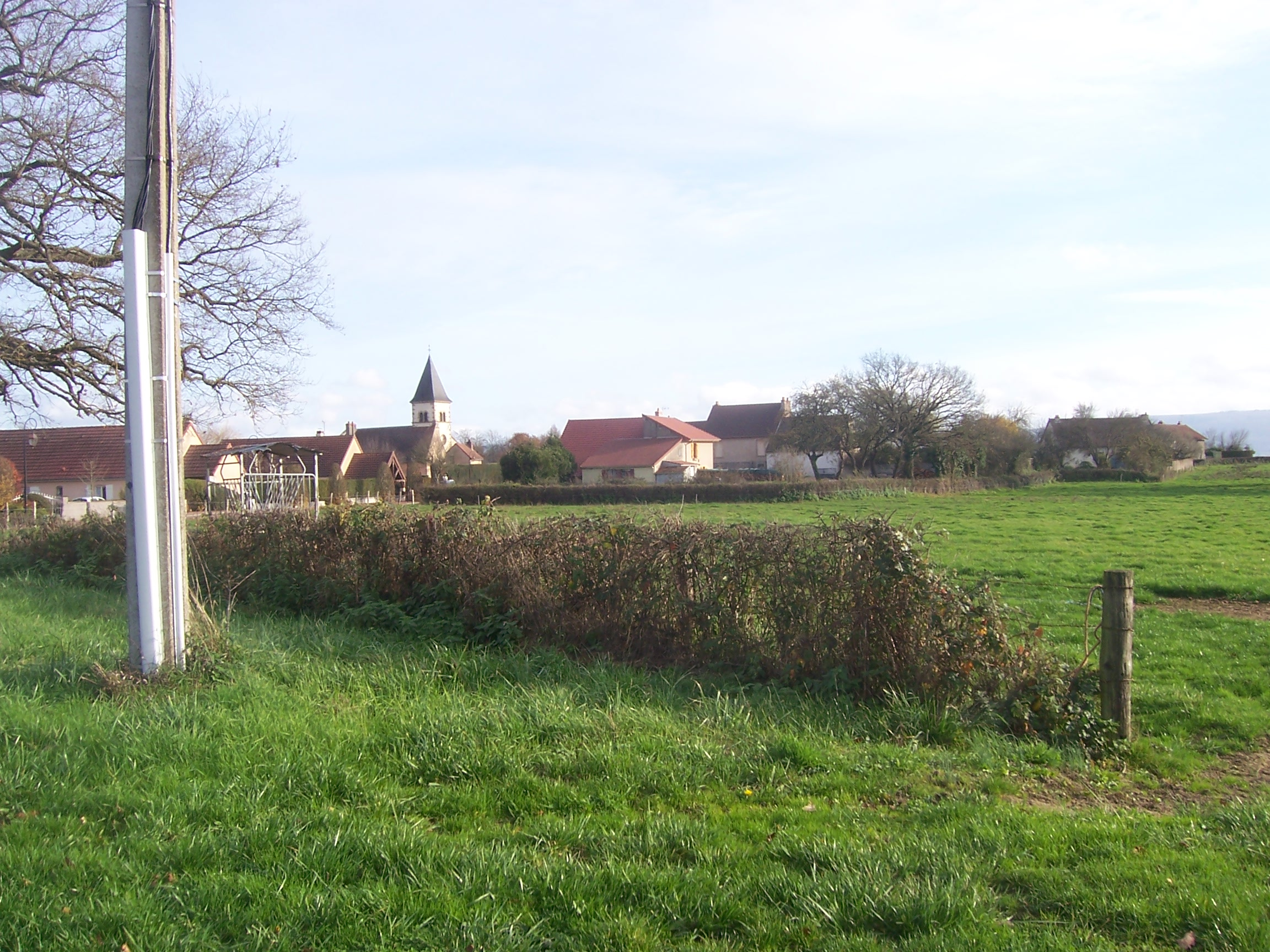 Saint-Forgeot